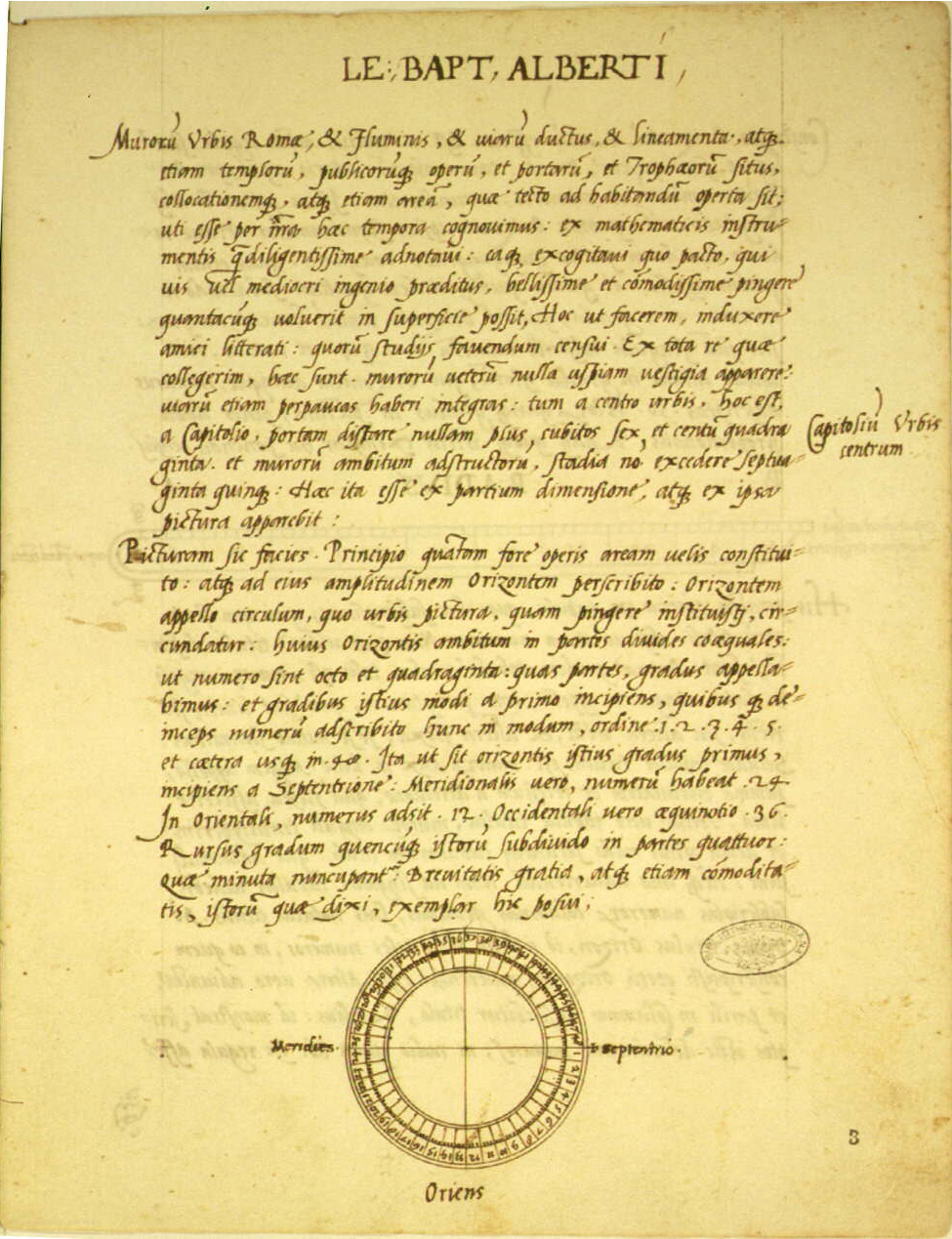 1 Seite aus "Descriptio urbis Romae"